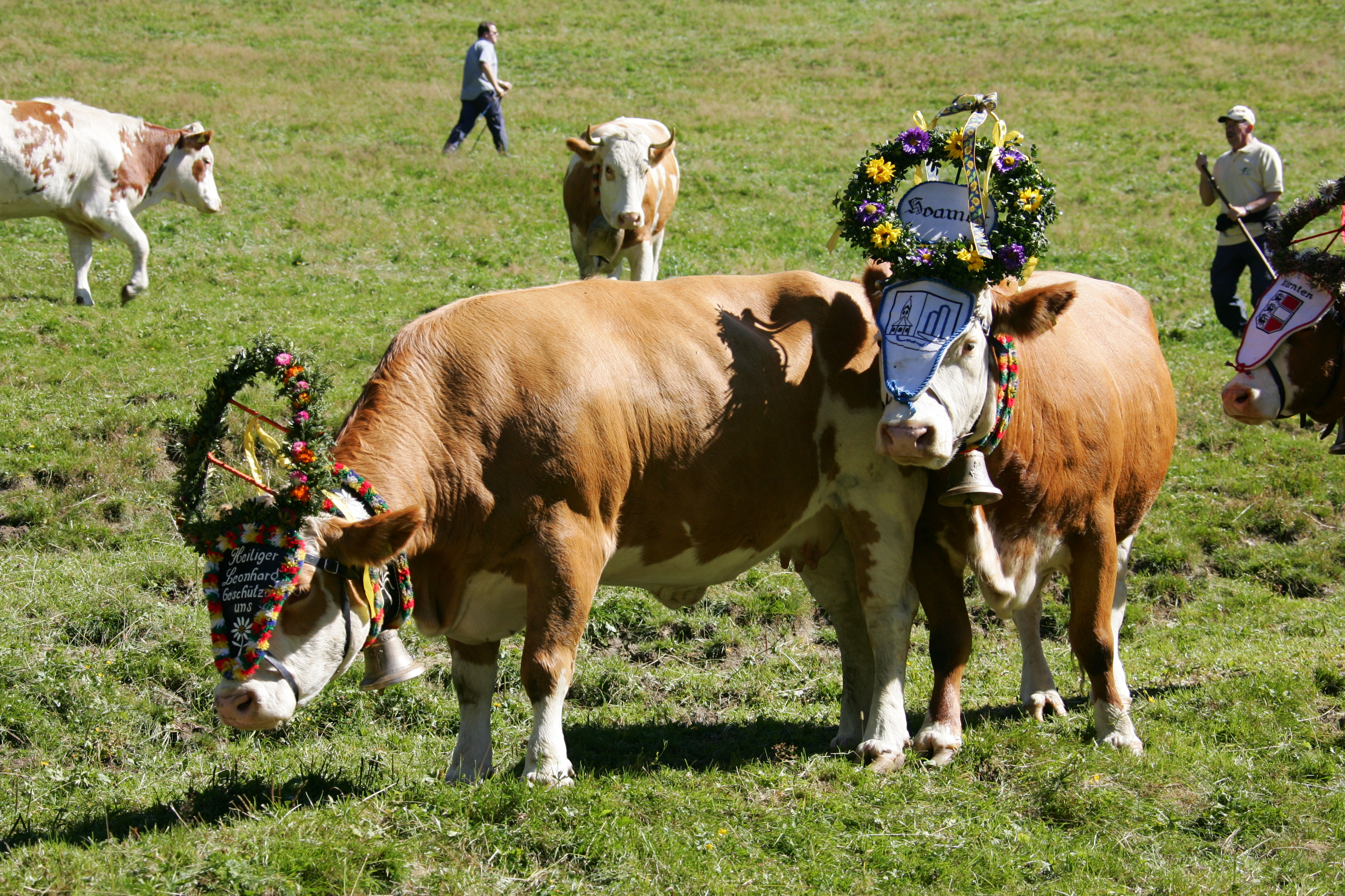 Almabtrieb nach Bad Kleinkirchheim im Jahr 2006